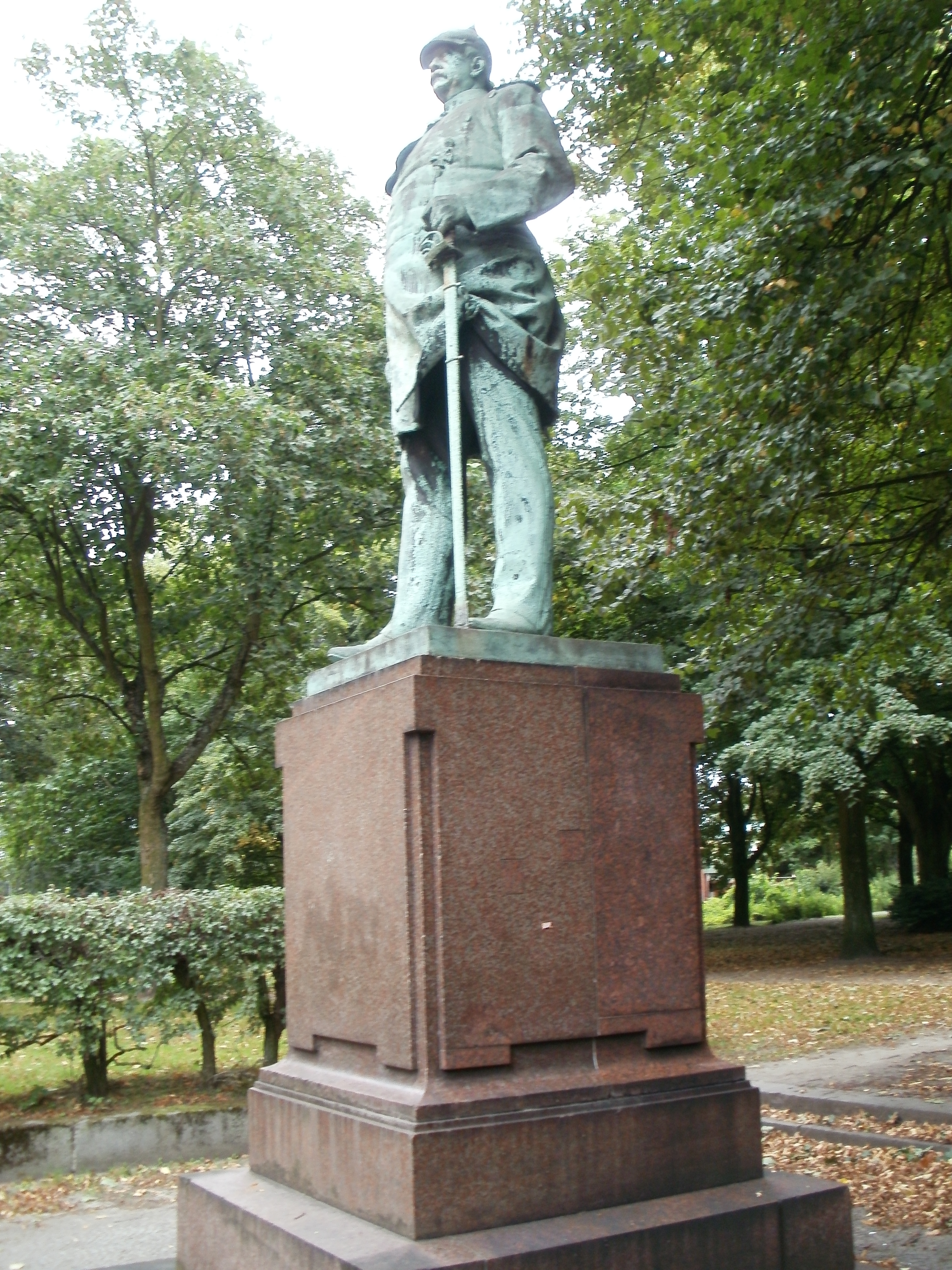 Bild vom Bismarck-Denkmal im Schleepark Hamburg-Altona